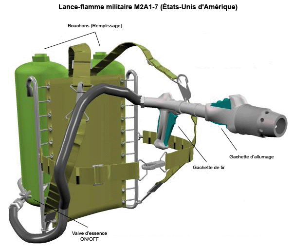 M2A1-7 USA Army Flamethrower (USA) avec indiquations. Créé avec un logiciel 3D par Anthony Appleyard en libre de droit. Version recoupée et francisée. (